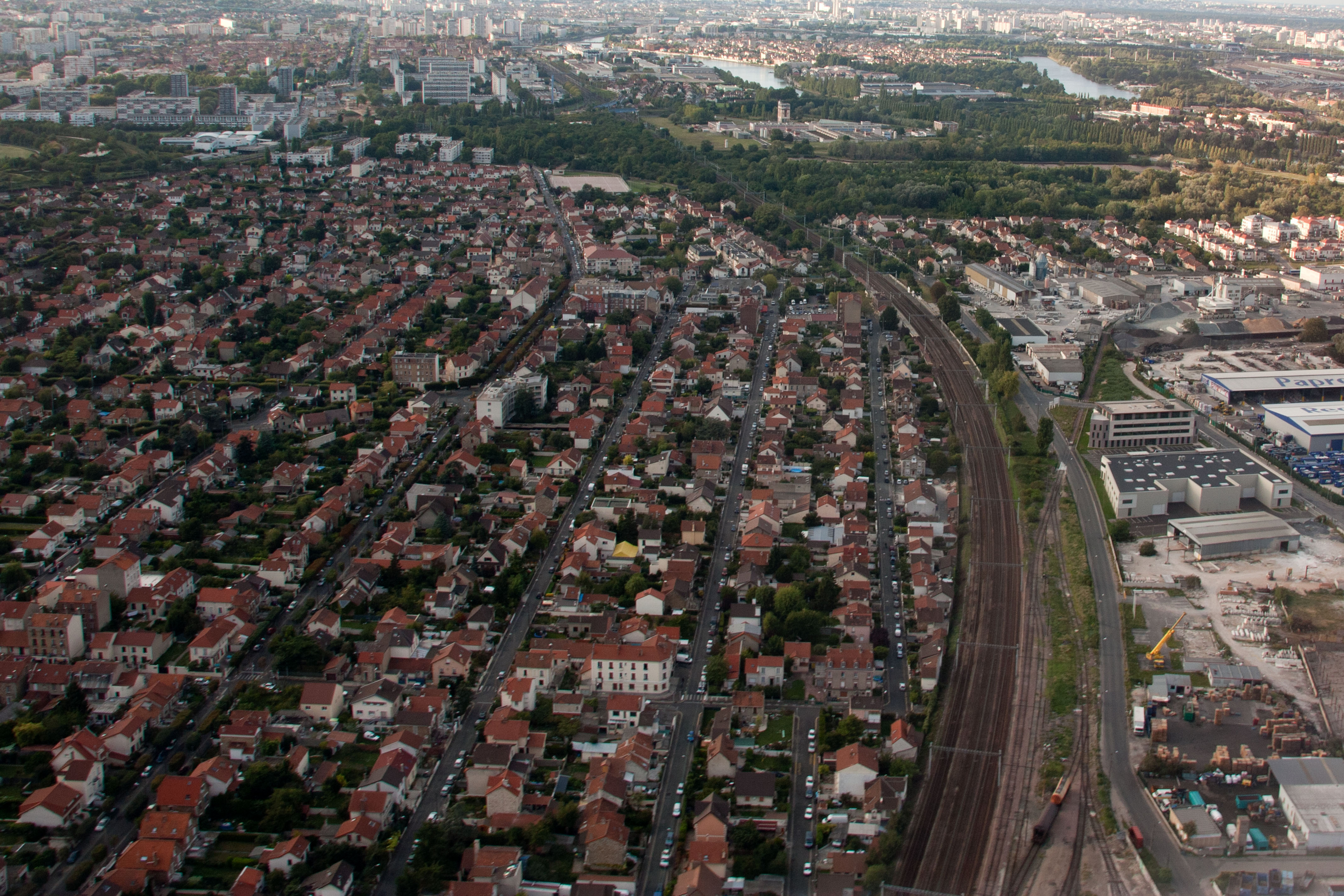 Vue aérienne de Villeneuve-le-Roi, Val-de-Marne, France